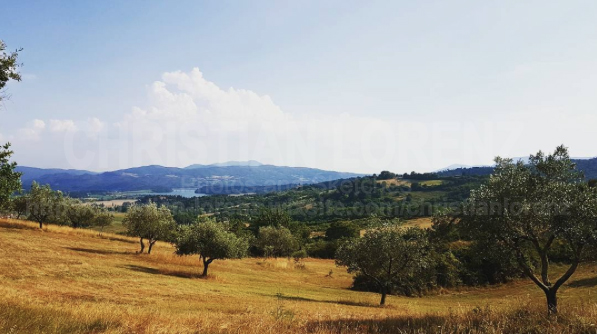 Veduta del Lago di Bilancino da Località Apparita (Via di Panna, Galliano di Mugello)